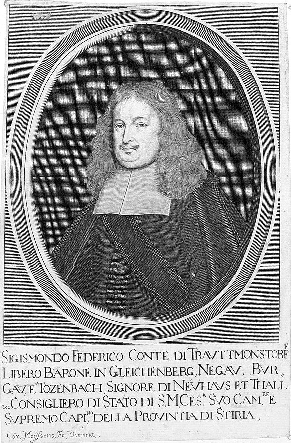 Grafik aus dem Klebeband Nr. 2 der Fürstlich Waldeckschen Hofbibliothek Arolsen Motiv: Siegmund Friedrich von Trauttmannsdorff (1623–1675), Landeshauptmann der Steiermark